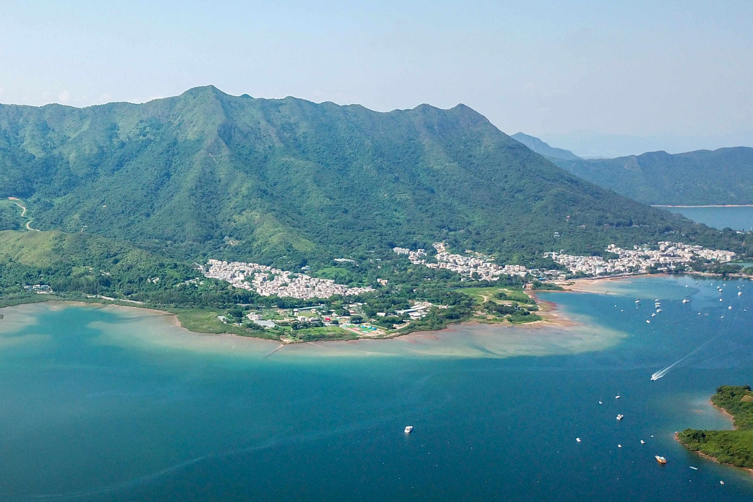 Ting Kok